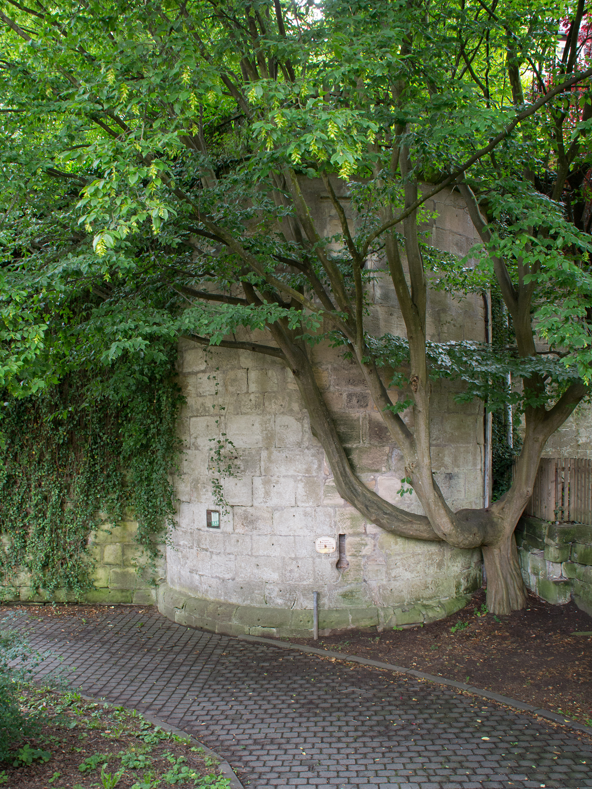 Turmstumpf des Schiefer- oder Mäuseturms am Stadtgraben in Kronach